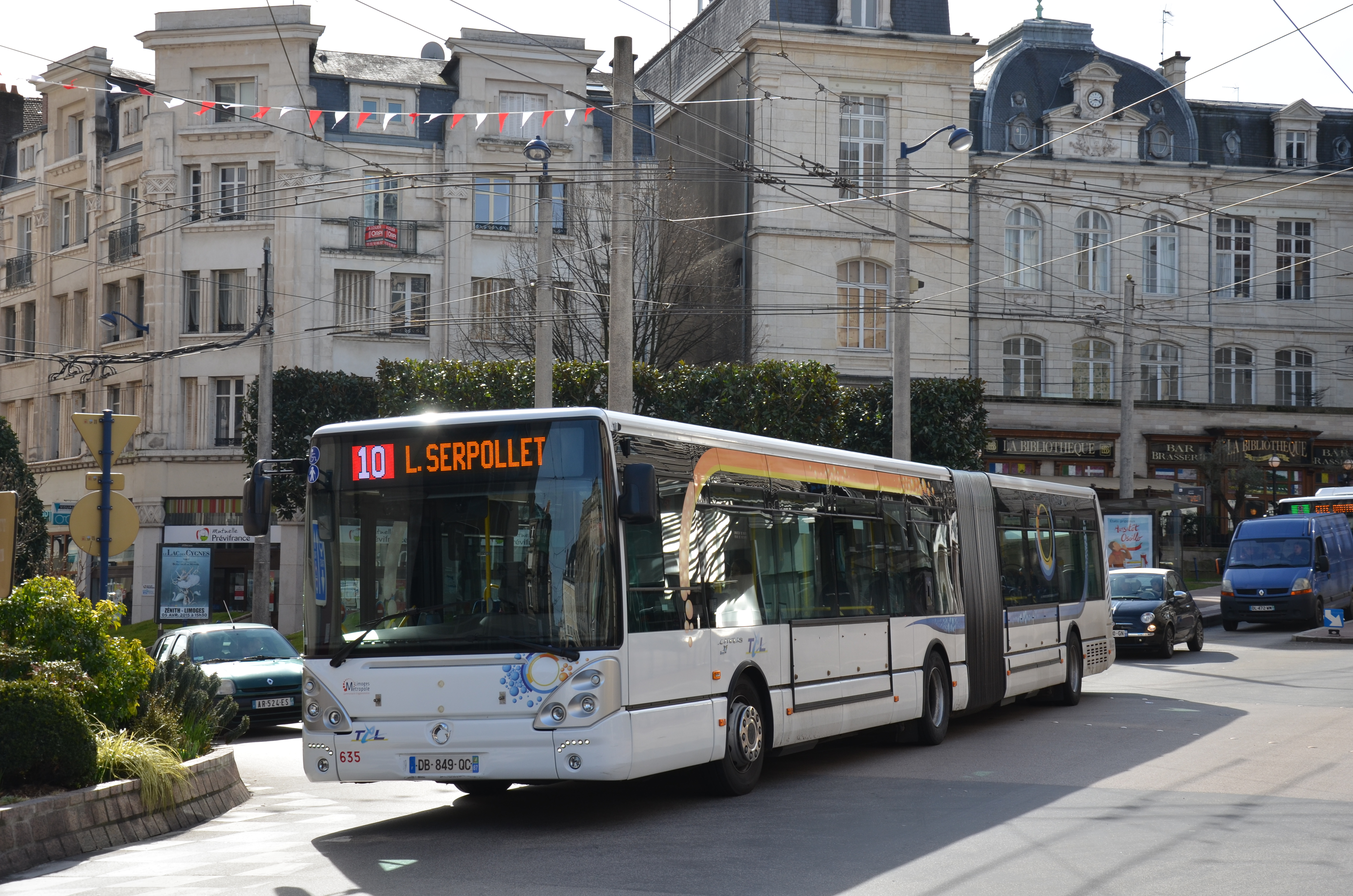 Irisbus Citelis 18 n°635 sur la ligne 10 du réseau TCL de Limoges, près de l'arrêt Poste.